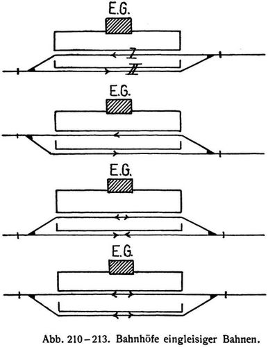 Abbildungen 210 bis 213 aus Röll, Freiherr von: Enzyklopädie des Eisenbahnwesens, Band 1. Berlin, Wien 1912